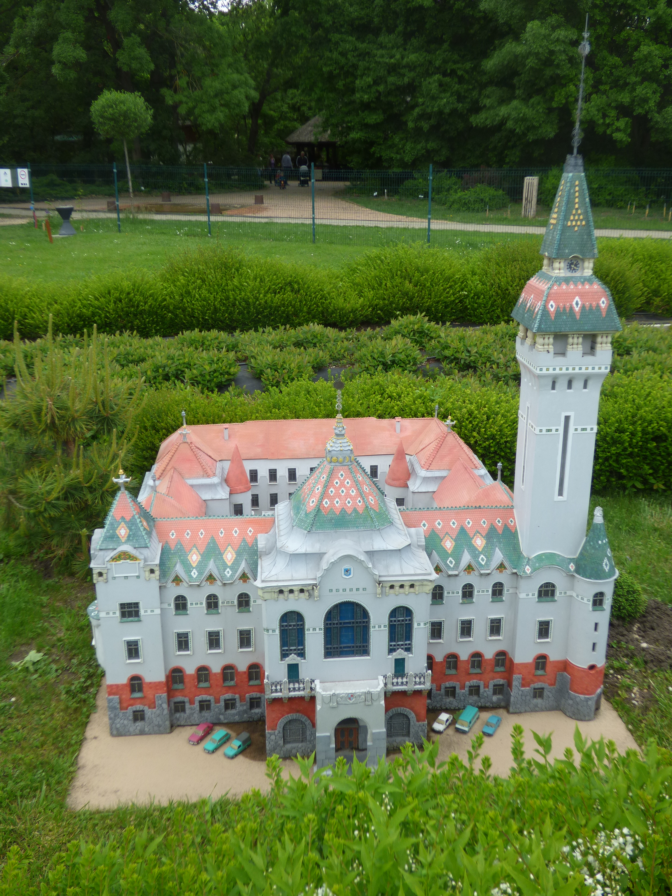 A marosvásárhelyi városháza makettje a szarvasi Mini Magyarország gyűjteményében